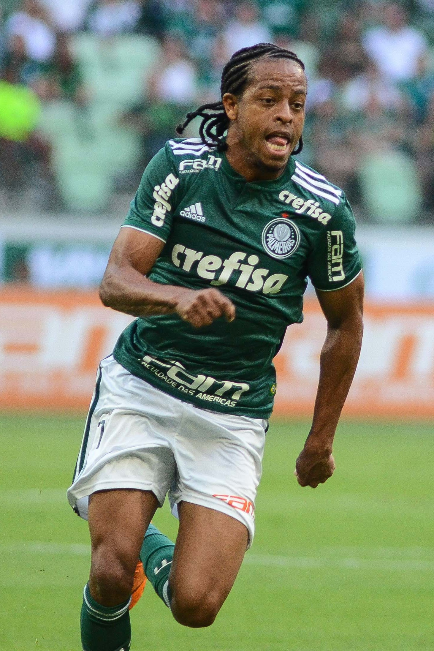 Players of Sociedade Esportiva Palmeiras